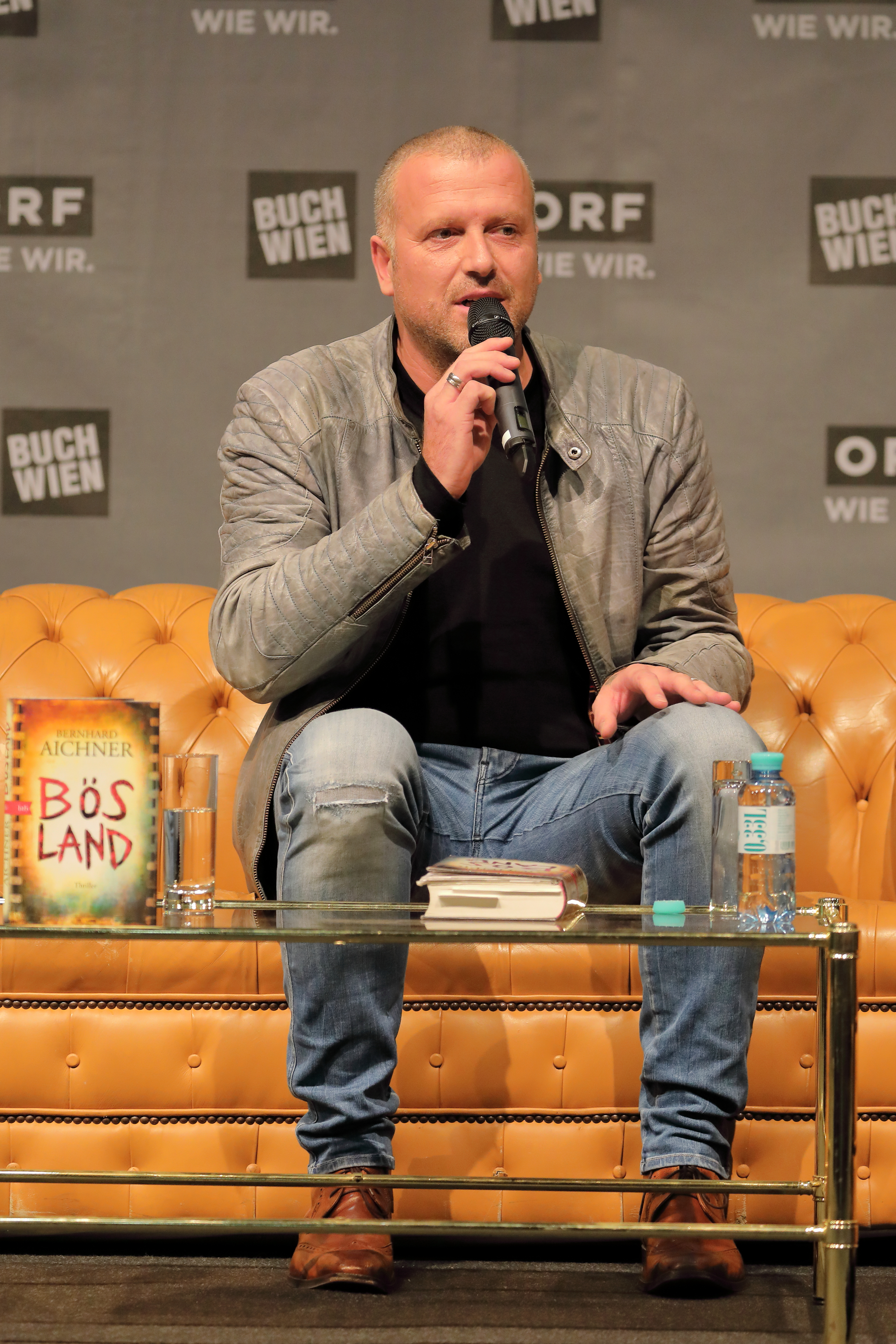 Der Schriftsteller Bernhard Aichner bei der Präsentation seines Buches „Bösland“ auf der ORF-Bühne der Wiener Buchmesse 2018.